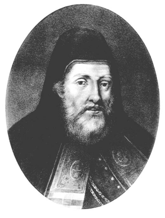 Портрет Кирила Терлецького.